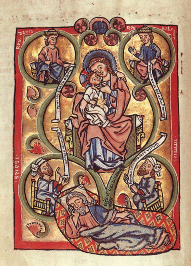 Wurzel Jesse mit Maria und Kind; Miniatur aus dem Scherenberg-Psalter, Pergamenthandscrift, 158 Blätter, 18,5 x 13 cm; Straßburg, c. 1260 Badische Landesbibliothek, Cod. St. Peter perg. 139, Blatt 7v